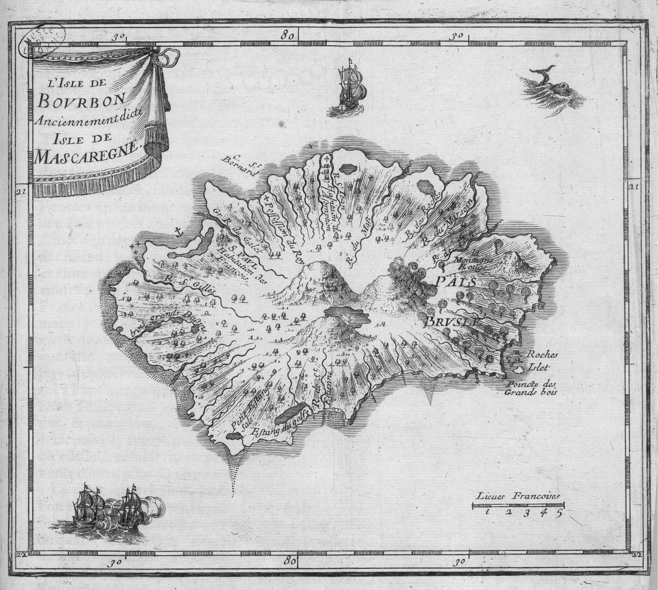 Carte de Bourbon parue dans l'Histoire de la Grande Isle de Madagascar.